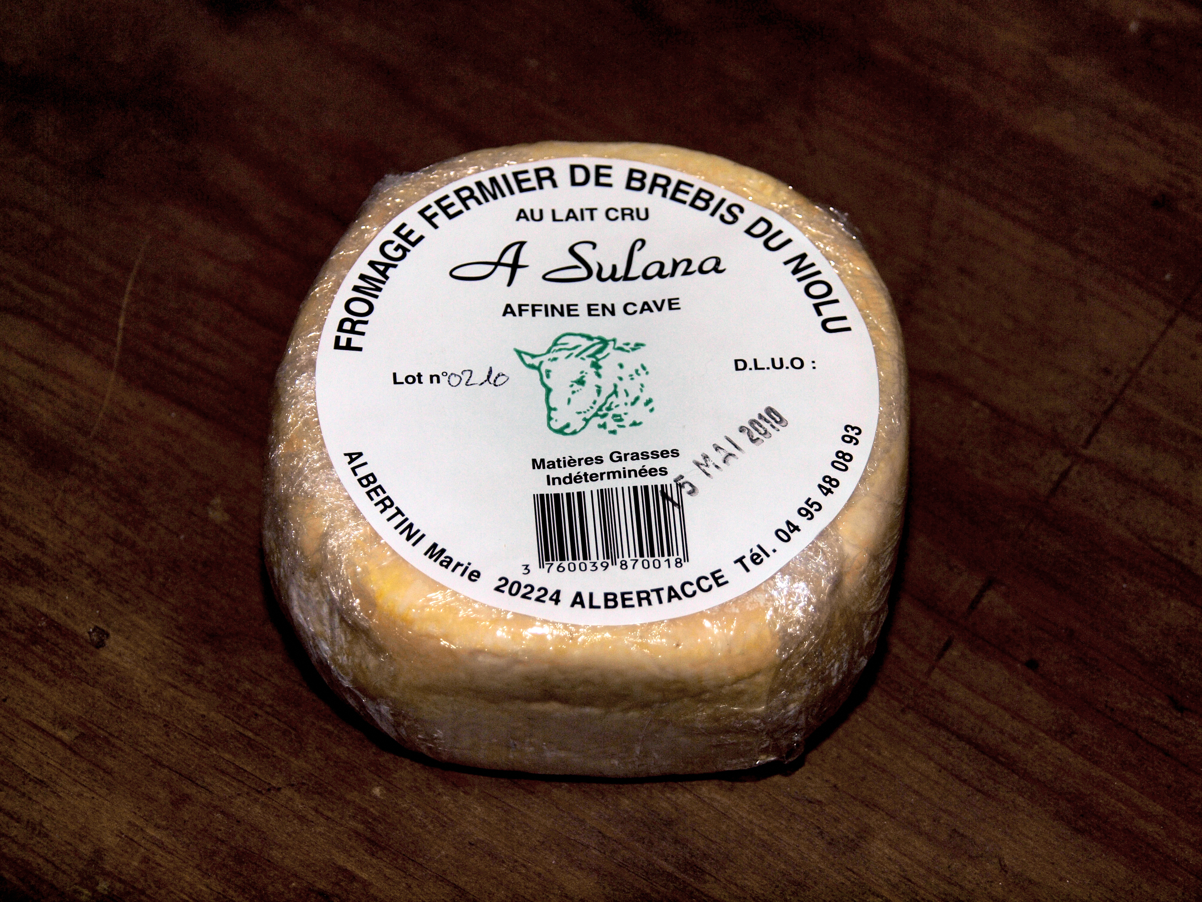 Albertacce (Corsica) - Fromage du Niolu